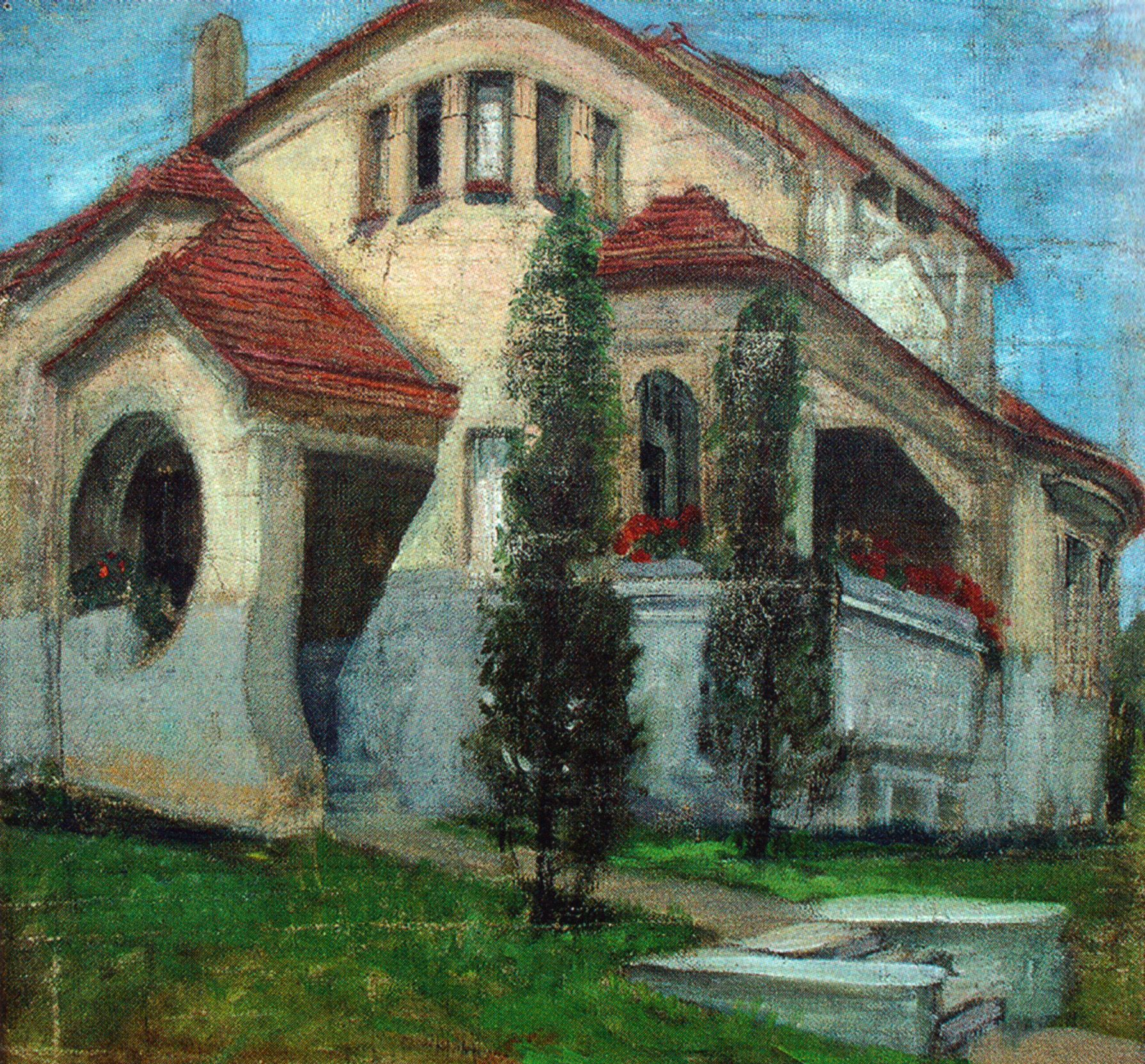 Quecks Privathaus in Leipzig-Leutzsch, Öl auf Karton